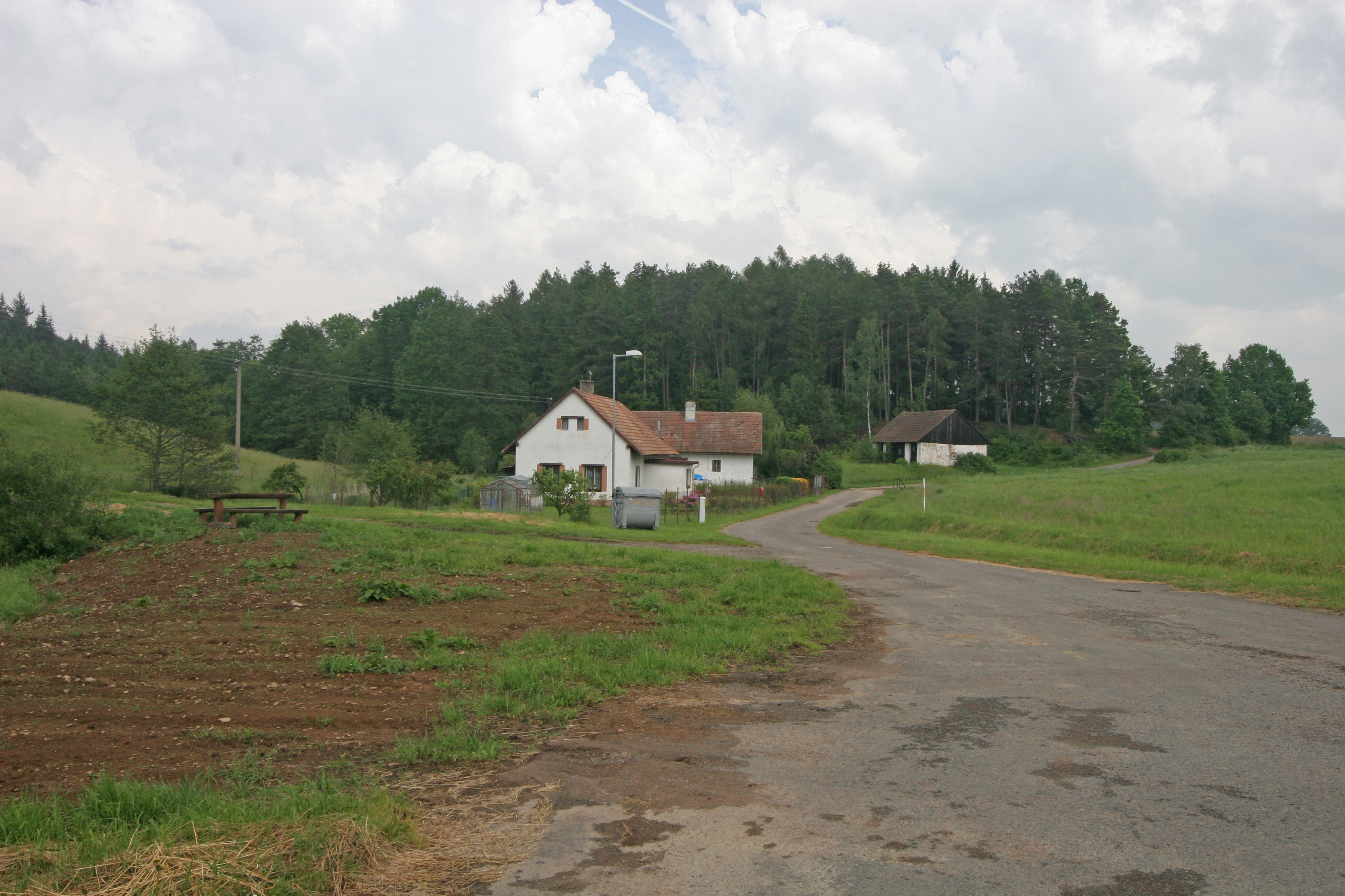 Pohořalka čp. 7